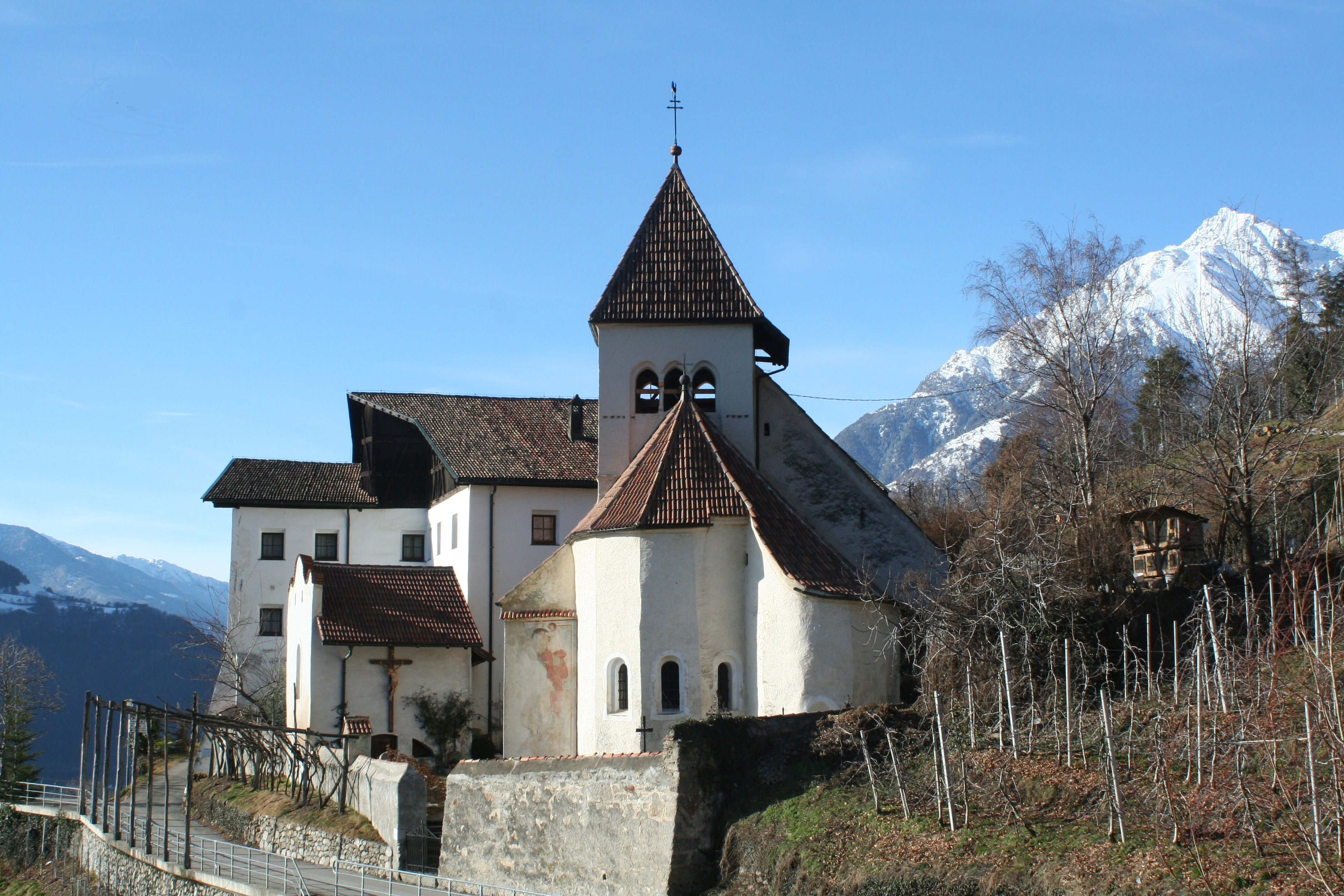 St. Peter mit Friedhofskapelle in Gratsch